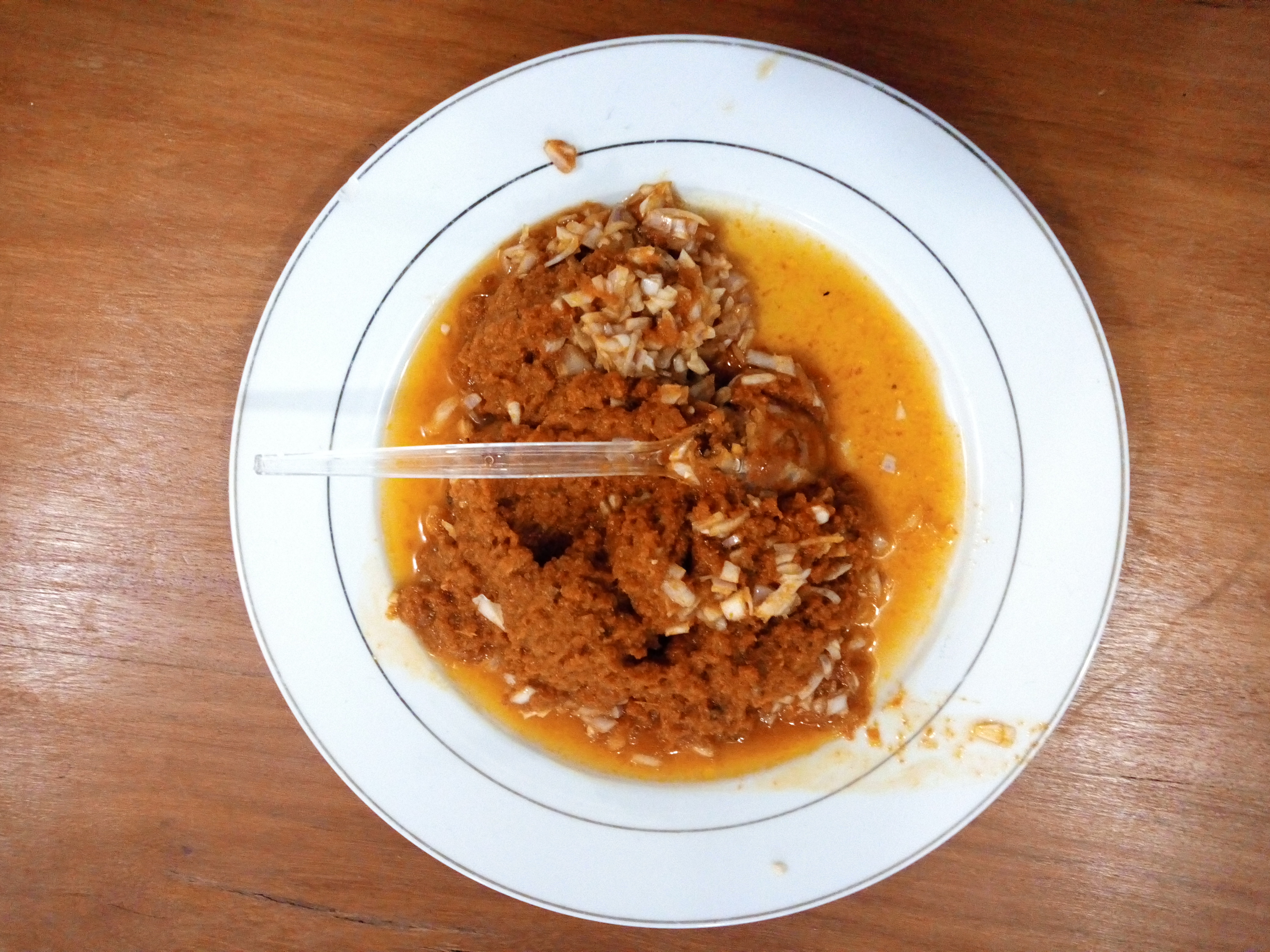 Piment et tomate comme accompagner igname frit et gâteau à base du haricot This photo has been taken in the country: Benin